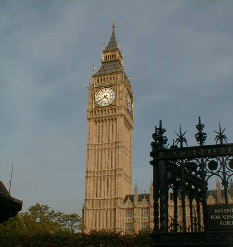 מגדל השעון ביג בן, לונדון, אנגליה